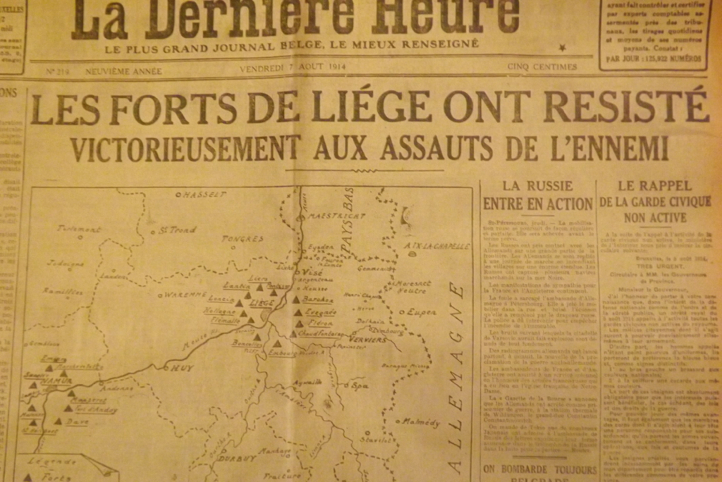 Les forts de Liege ont resite